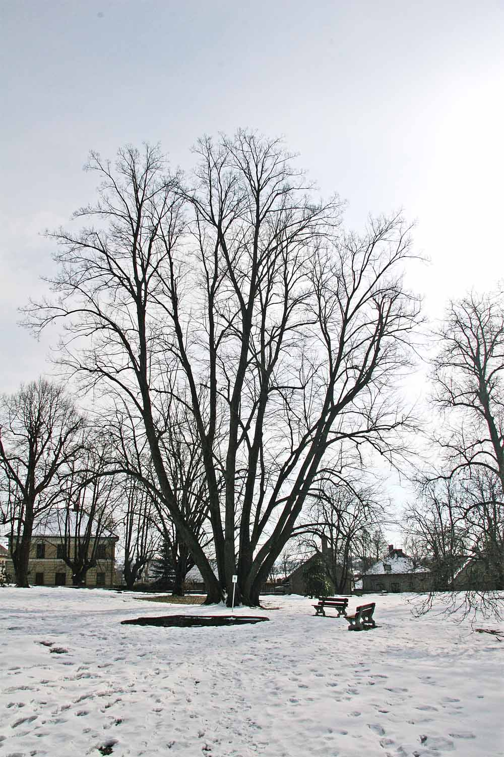 Památná lípa v zámeckém parku v obci Zámrsk